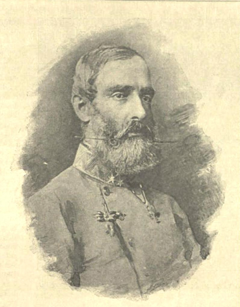 Ernő főherceg (1824–1899)